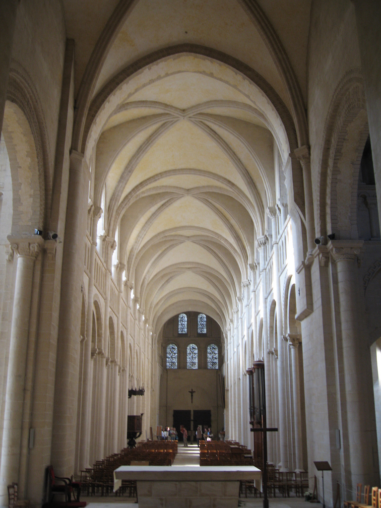 Nef de l'abbatiale de la Trinité de l'abbaye aux Dames de Caen depuis le chœur.